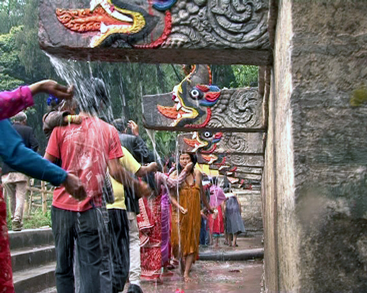 नेपाली: बालाजु बाइसधारा